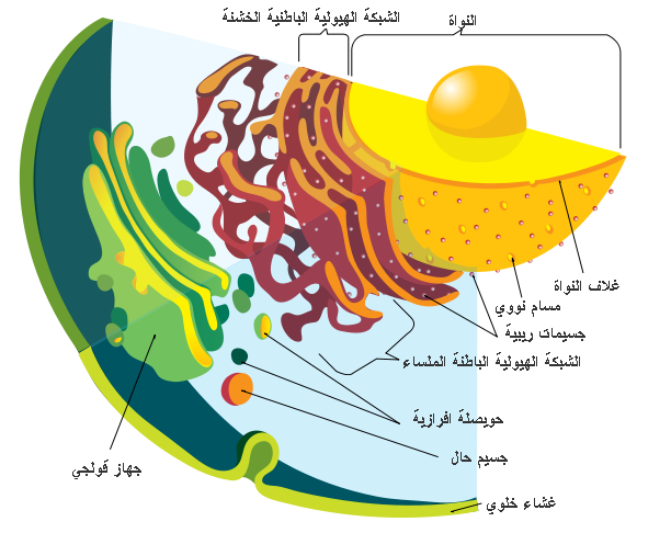 الجهاز الغشائي الداخلي في خلايا حقيقيات النوى